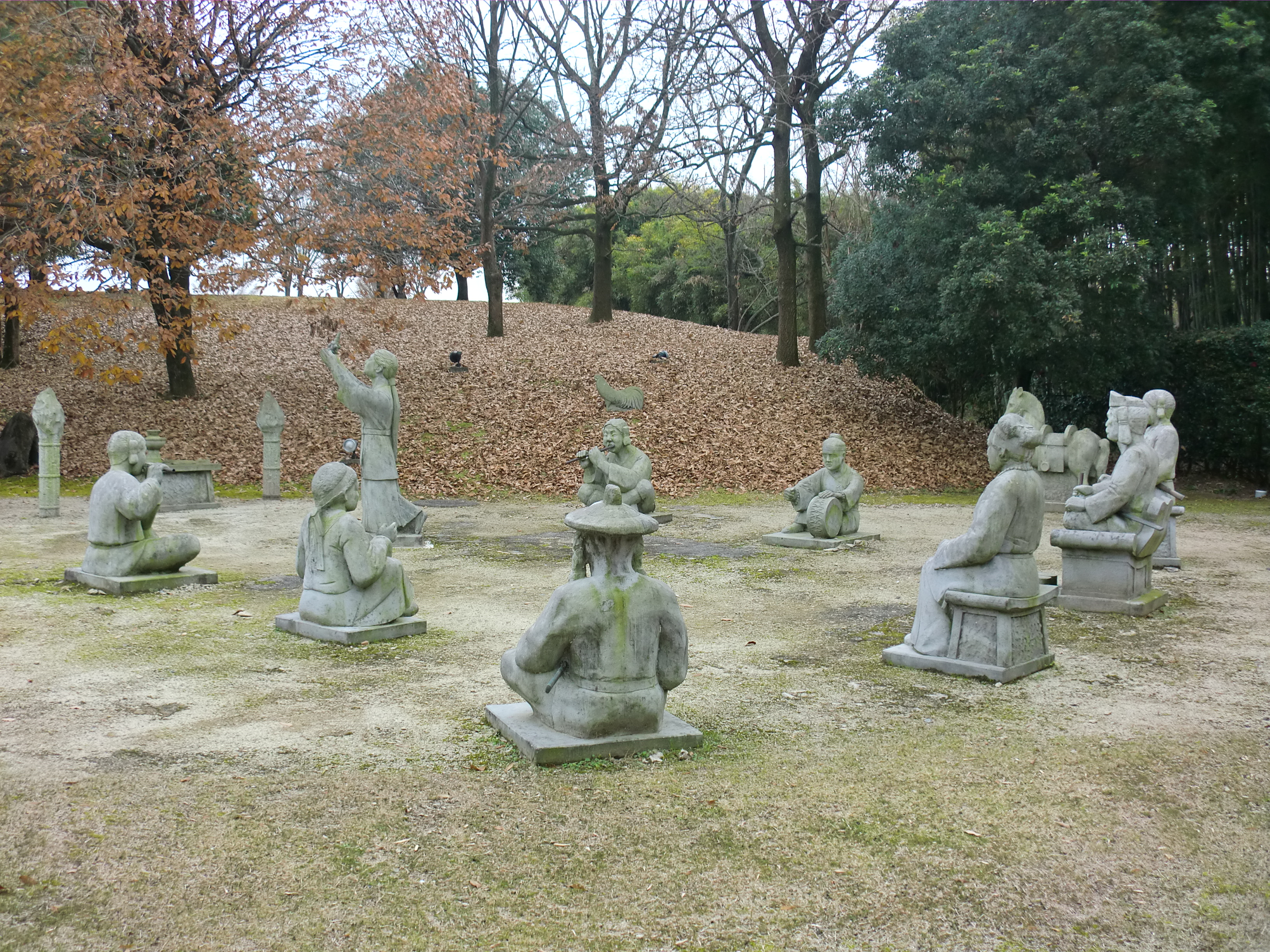 熊本市南区にある熊本市塚原（つかわら）歴史民俗資料館の展示品